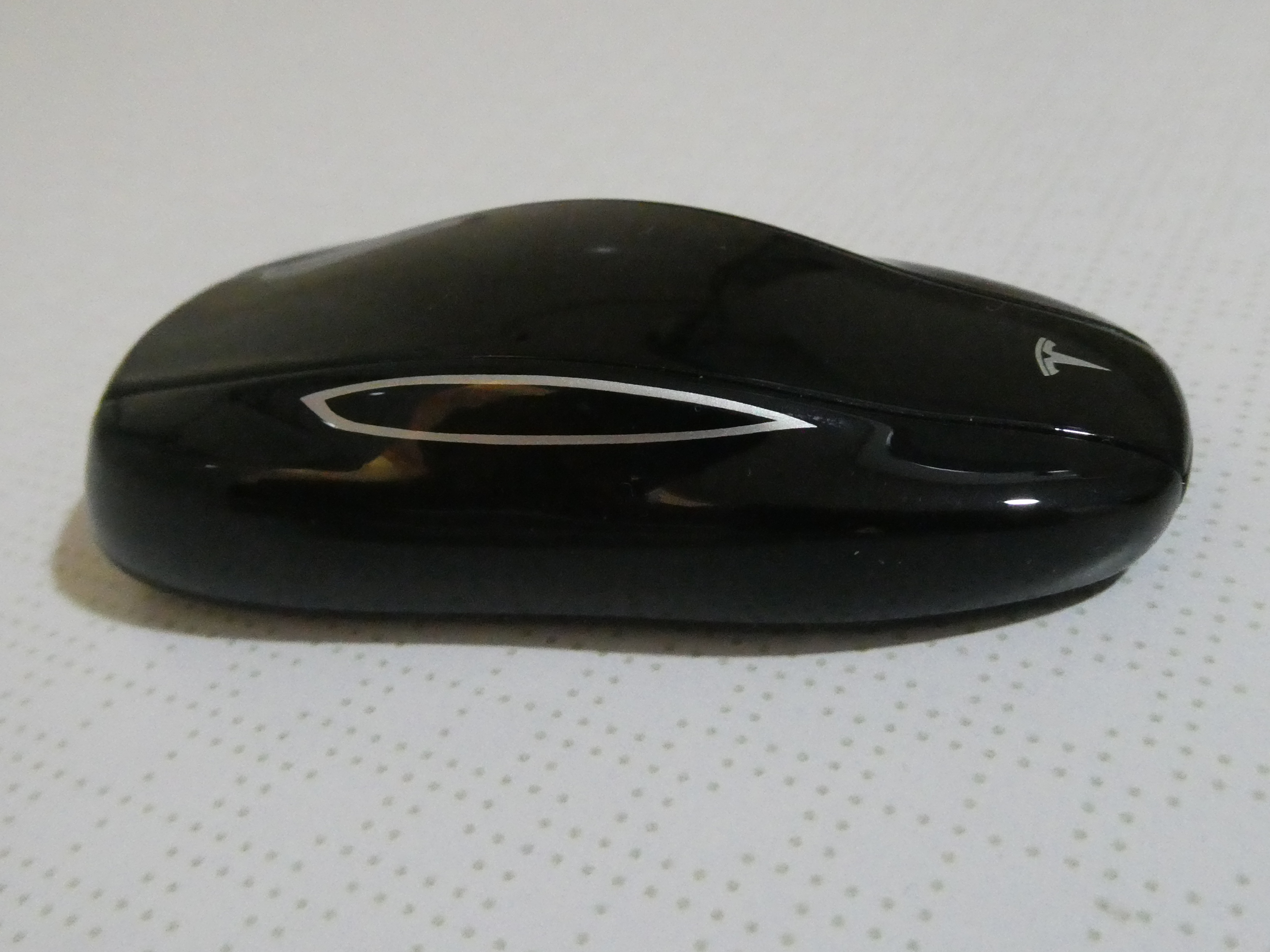 Llave y mando remoto de un Tesla Model 3. Permite abrir y cerrar el coche. Permite abrir el maletero trasero y delantero.